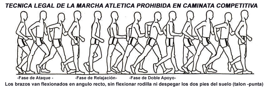 Tecnica de Marcha Atletica